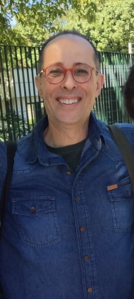 Autor nos Estúdios Globo de Televisão